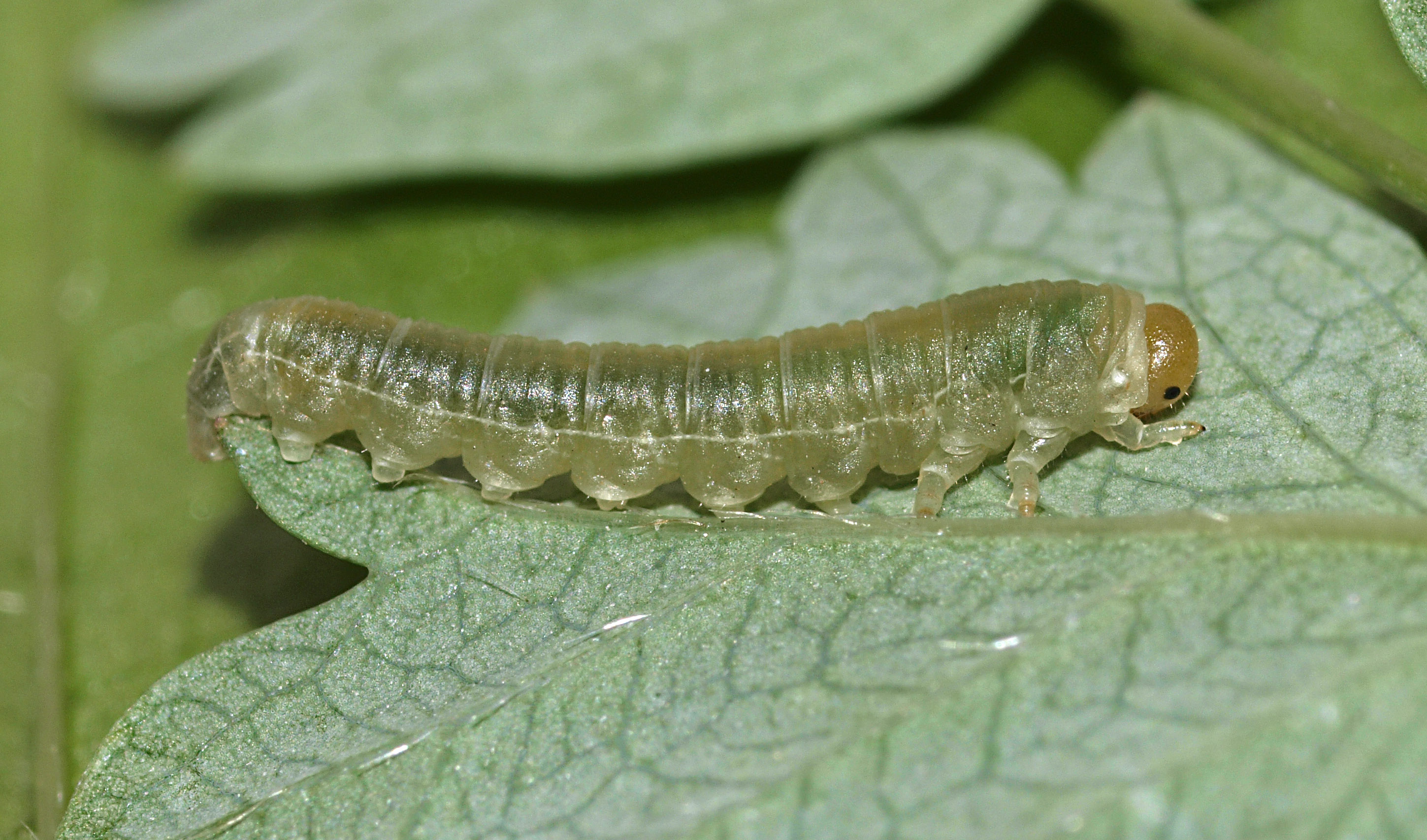 13 mm larva.